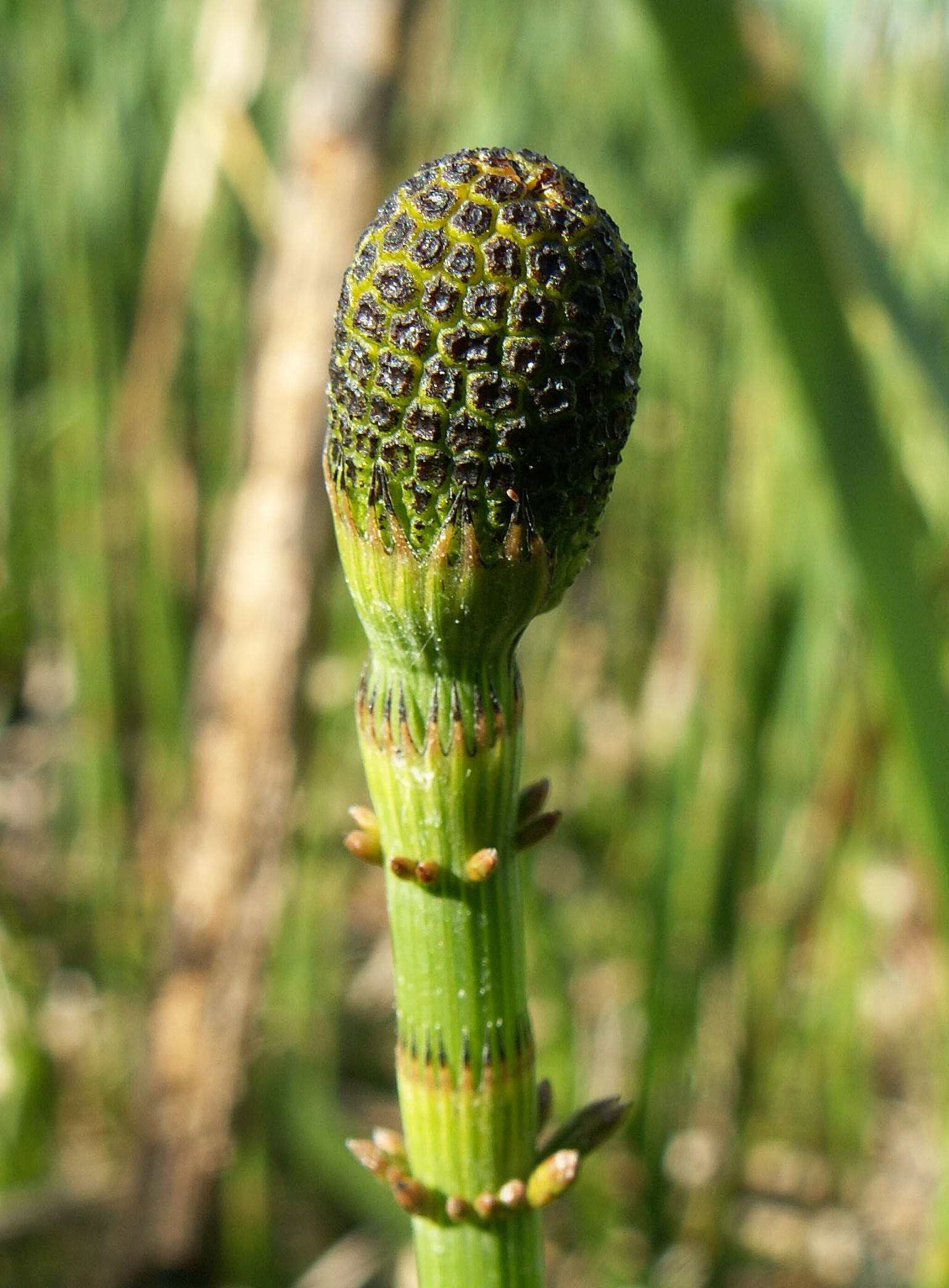 Equisetum fluviatile, strobilus. Czaplinek, NW Poland.